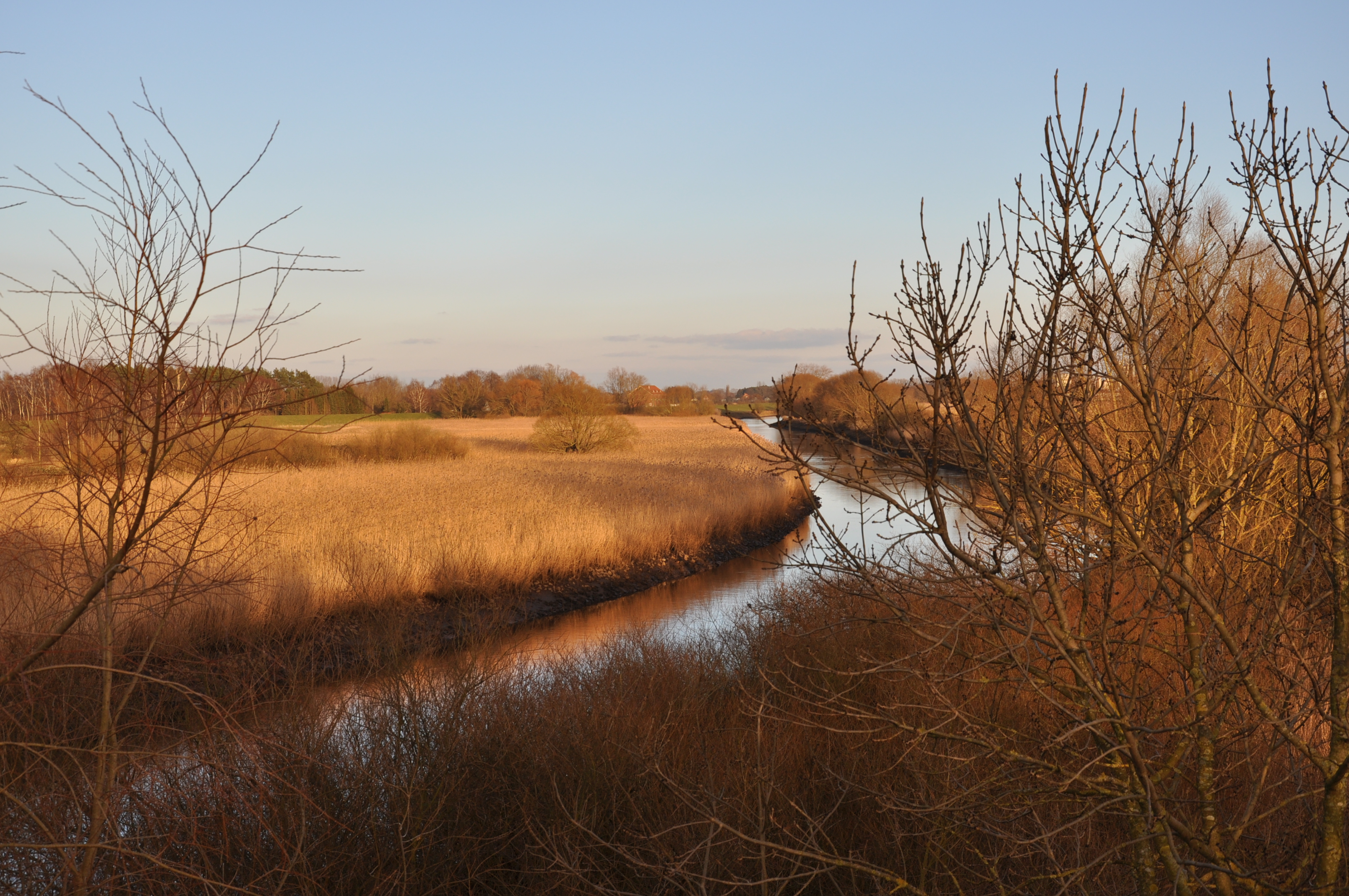 Blick von der Seebrücke bei Laßrönne auf die Ilmenau und das Naturschutzgebiet Ilmenau-Luhe-Niederung